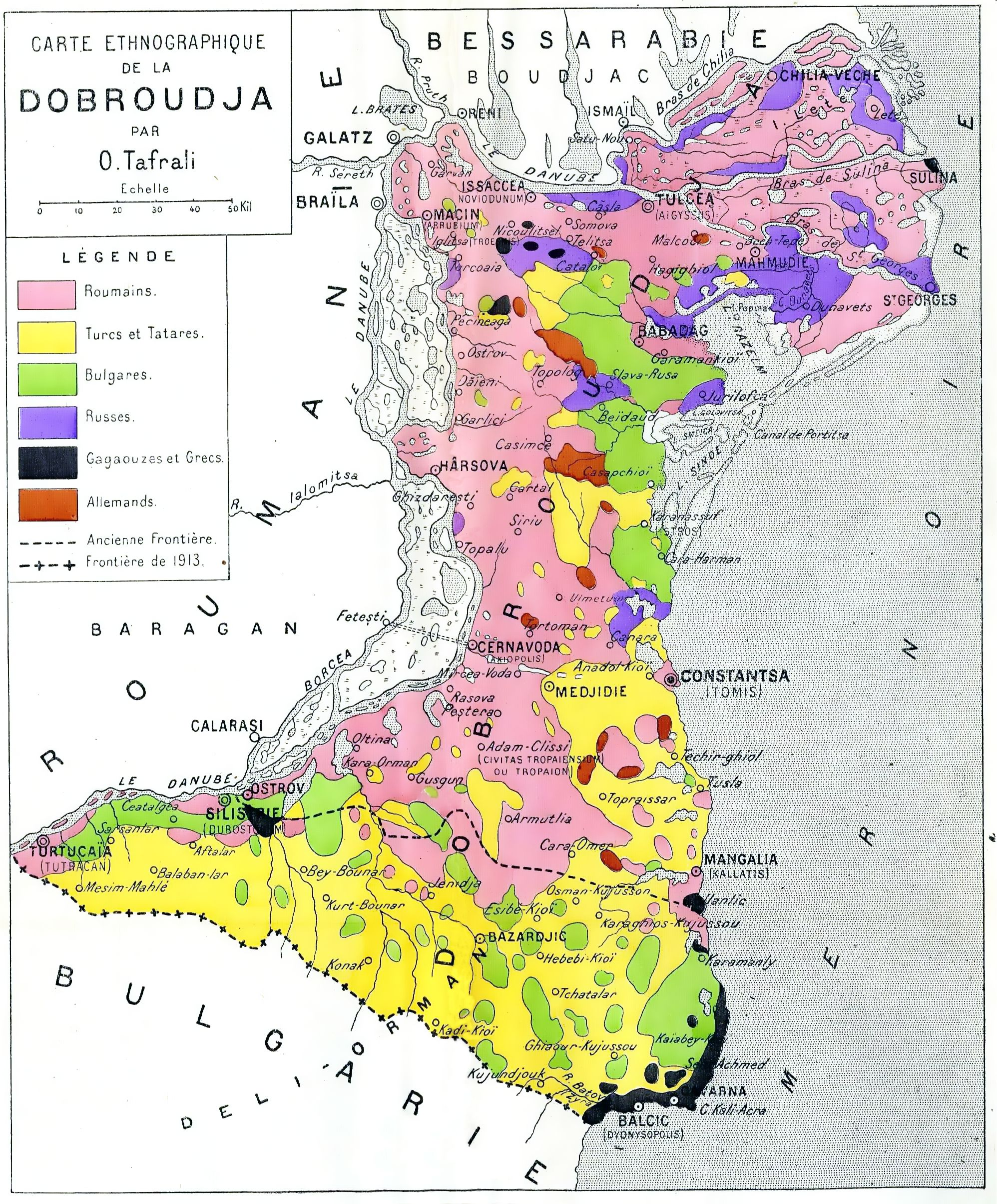 Carte ethnographique de la Dobroudja (1918)